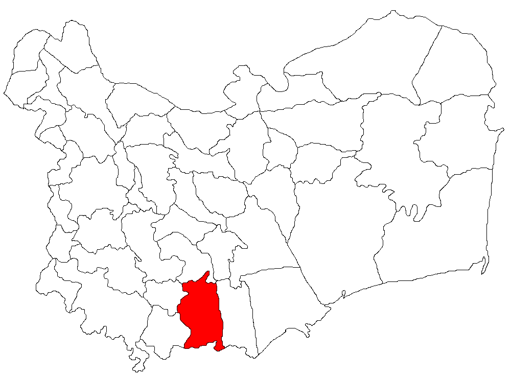 Categorie:Hărţi ale judeţului Tulcea